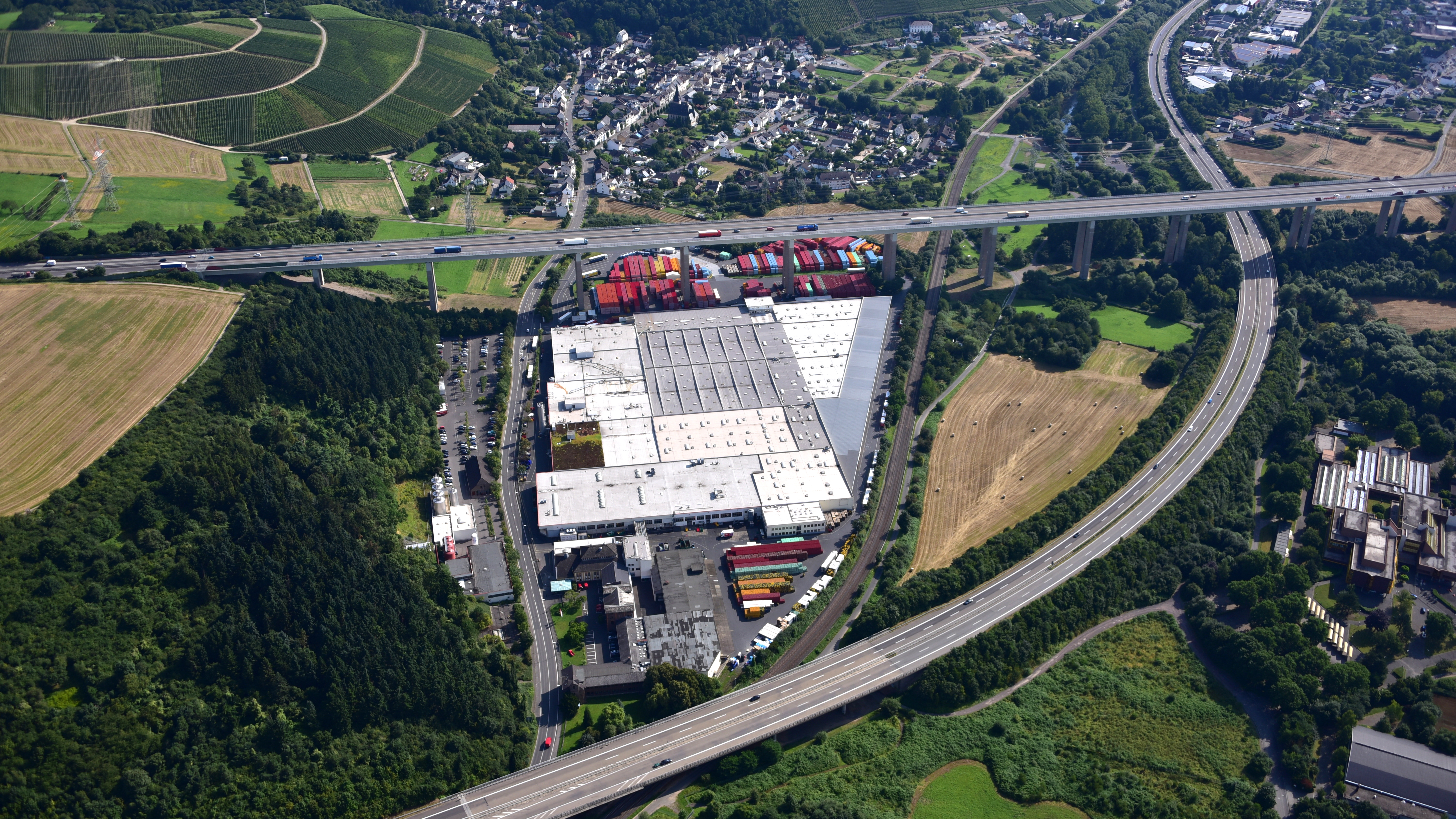 Apollinaris (Mineralwasser), Luftaufnahme (2016)